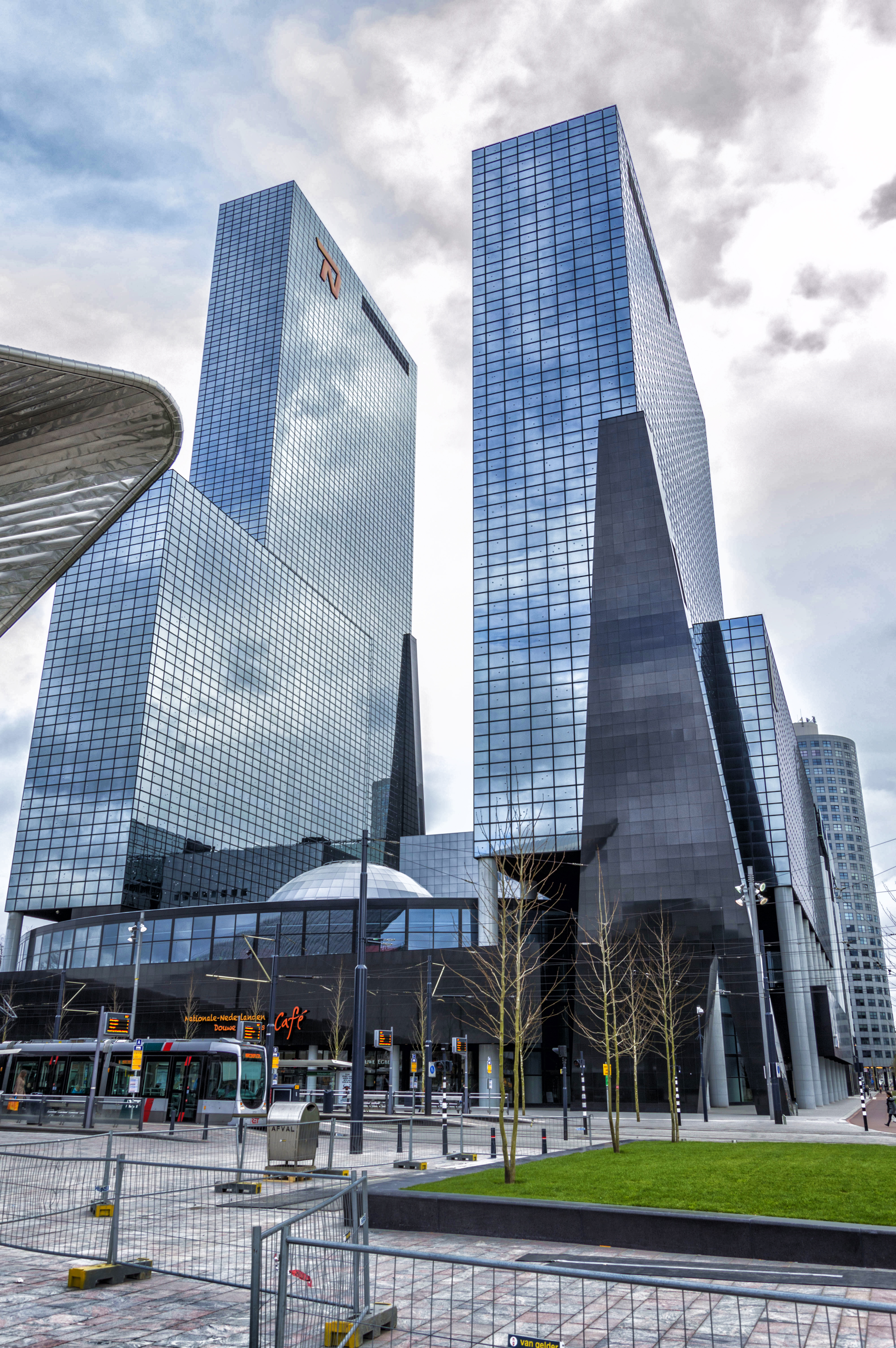 Weena-Stationsplein